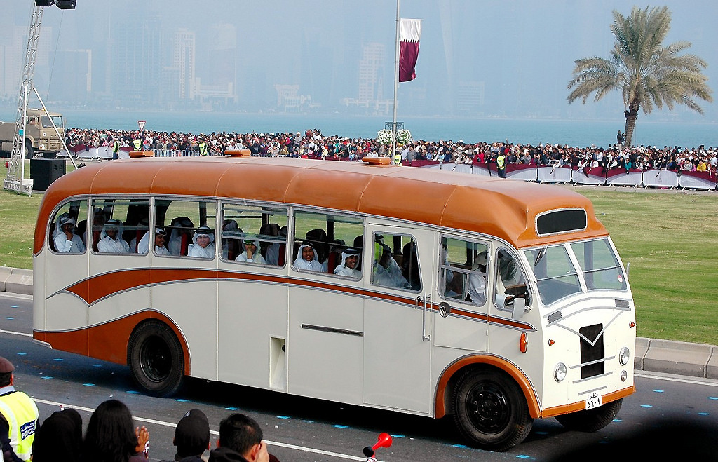 Doha, Qatar.